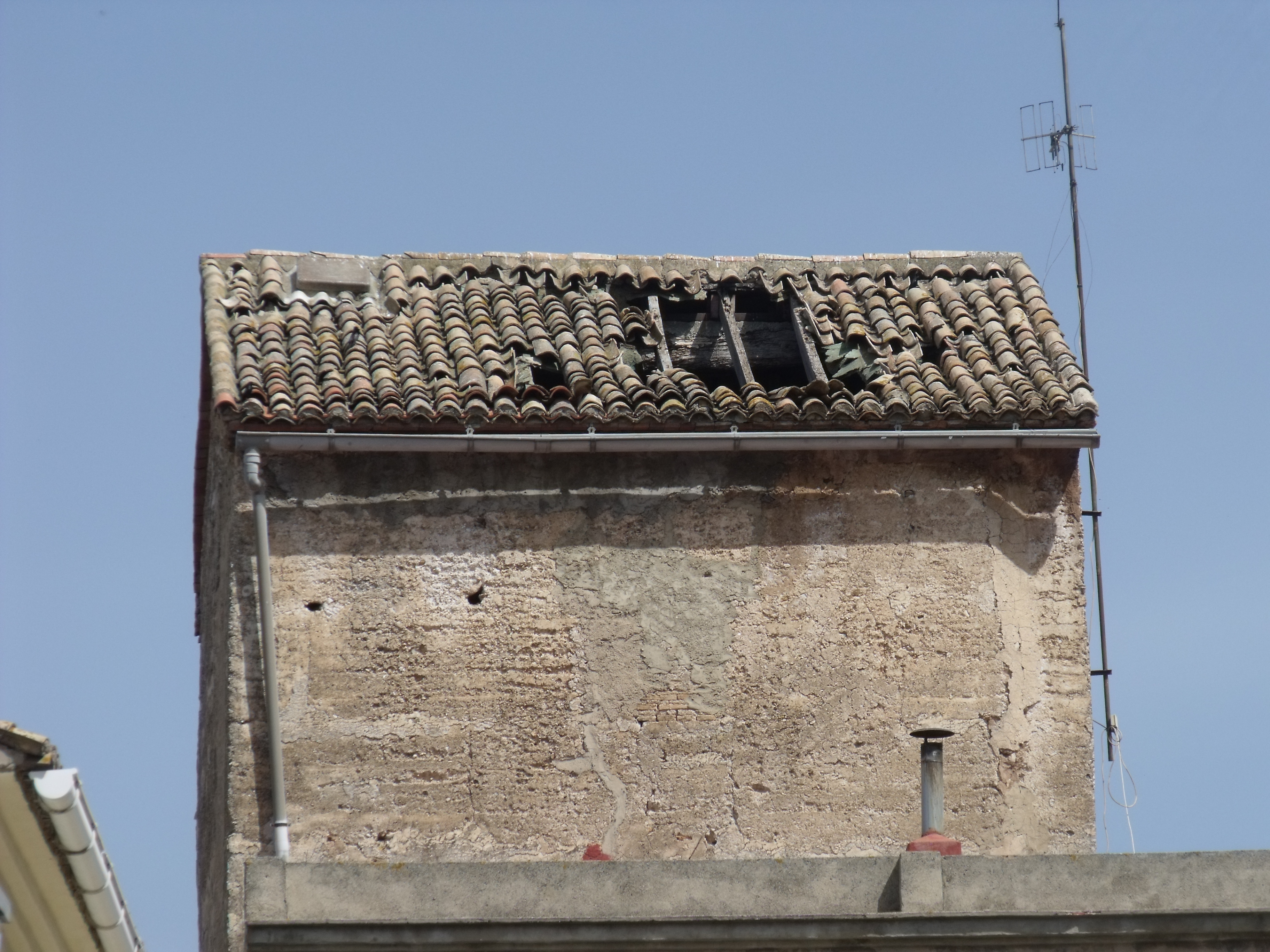 Torre d'Alfauir